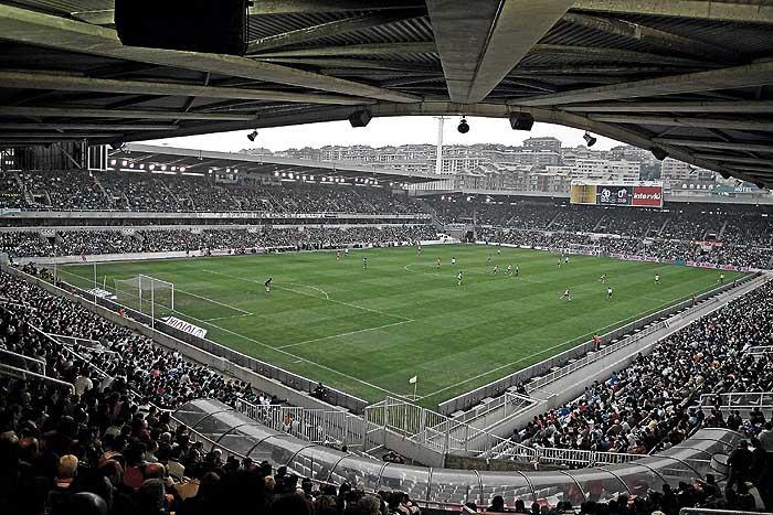 Campos de Sport del Sardinero. Capacidad 22400 espectadores.